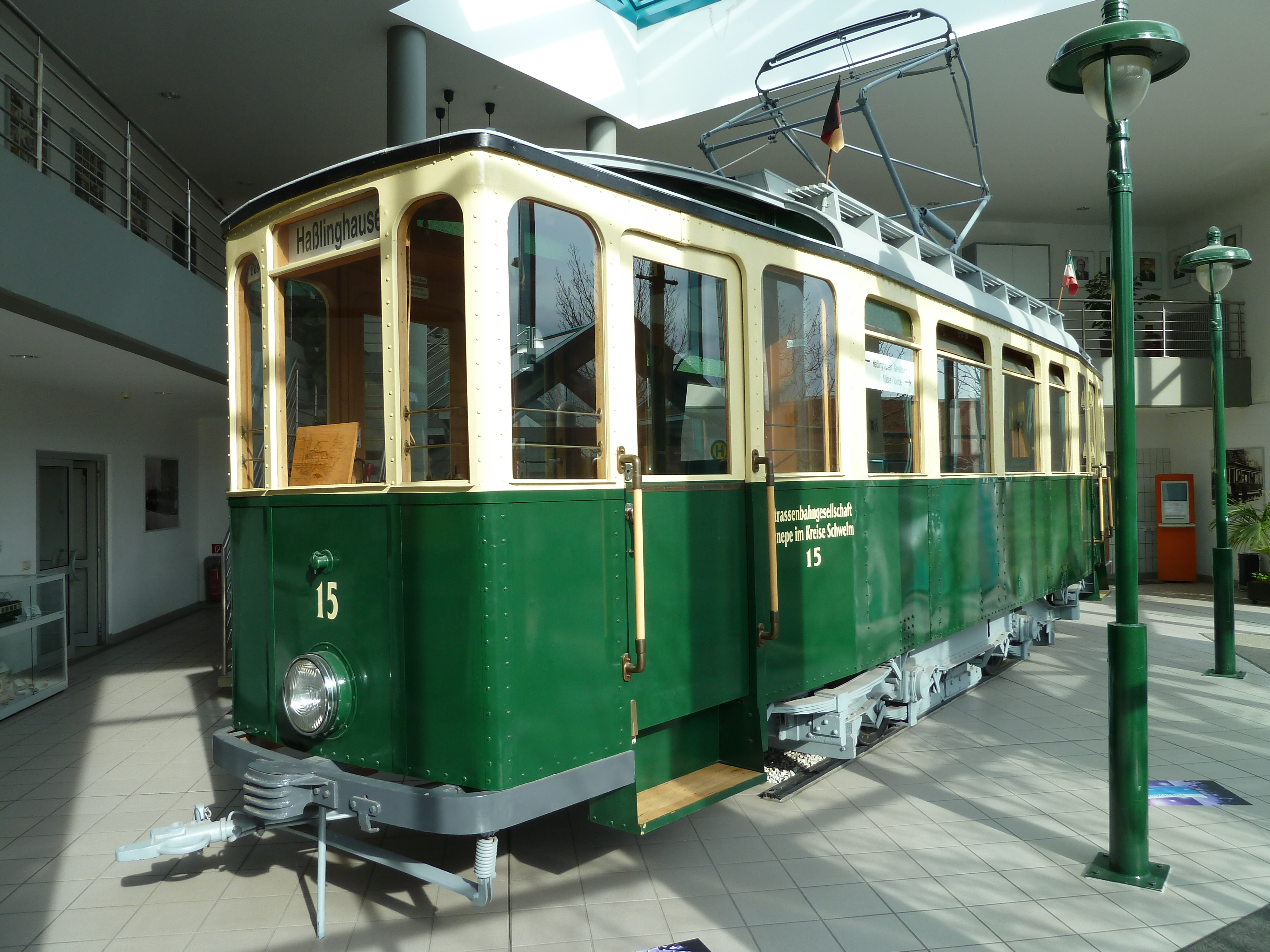 Straßenbahn-Triebwagen Nr. 15, Baujahr 1927, Standort VER-Foyer, Kölner Straße 303, eingetragenes Baudenkmal der Stadt Ennepetal This is a photograph of an architectural monument.